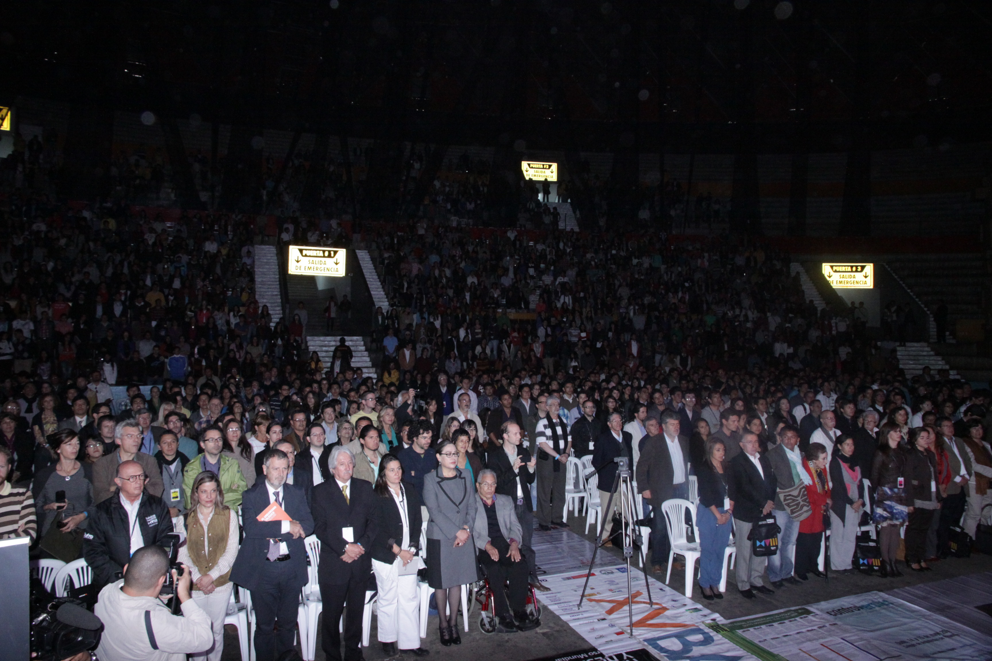 Foto: Hugo Ortiz Ron / Asamblea Nacional